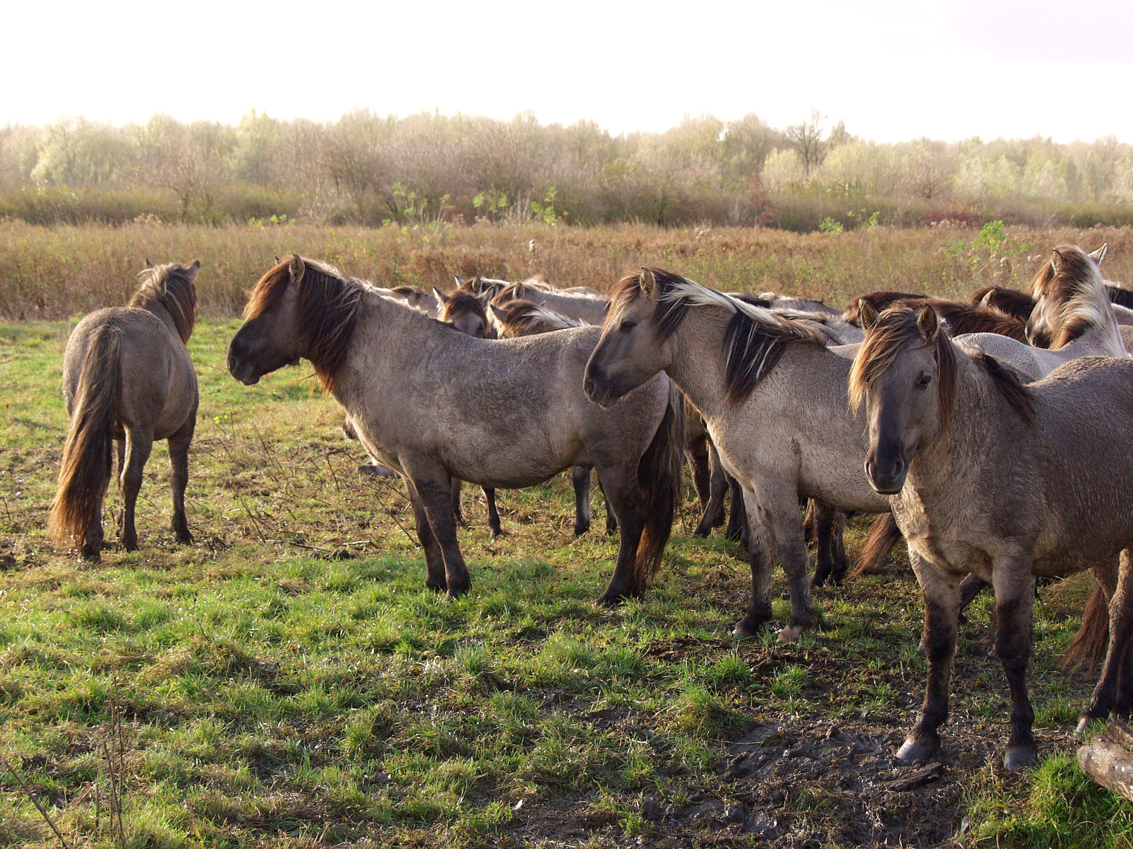 Konik-Pferde im Oostvaardersplassen Natuurmonument, Flevoland NL